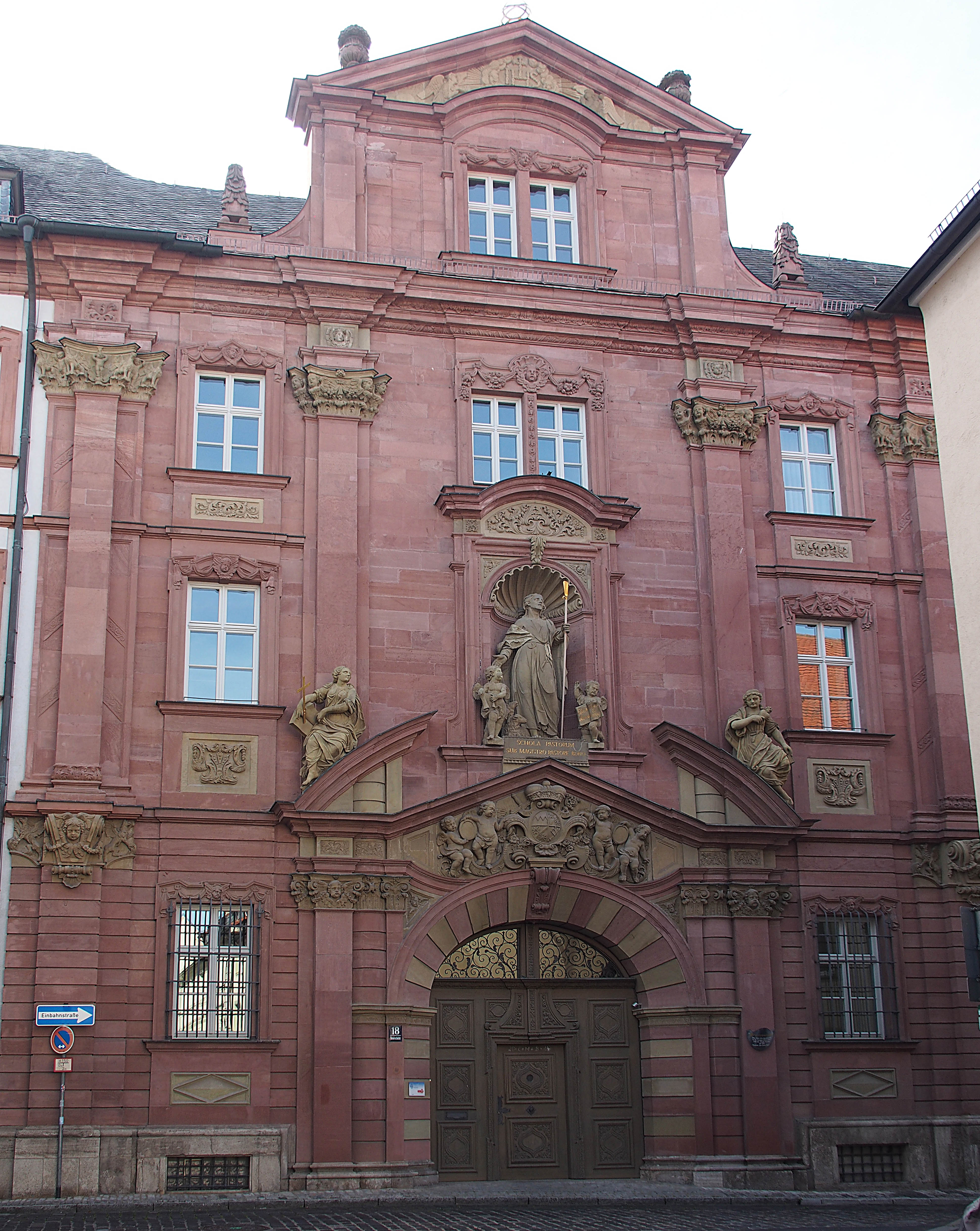 Priesterseminar Domerschulstr. 18, Würzburg